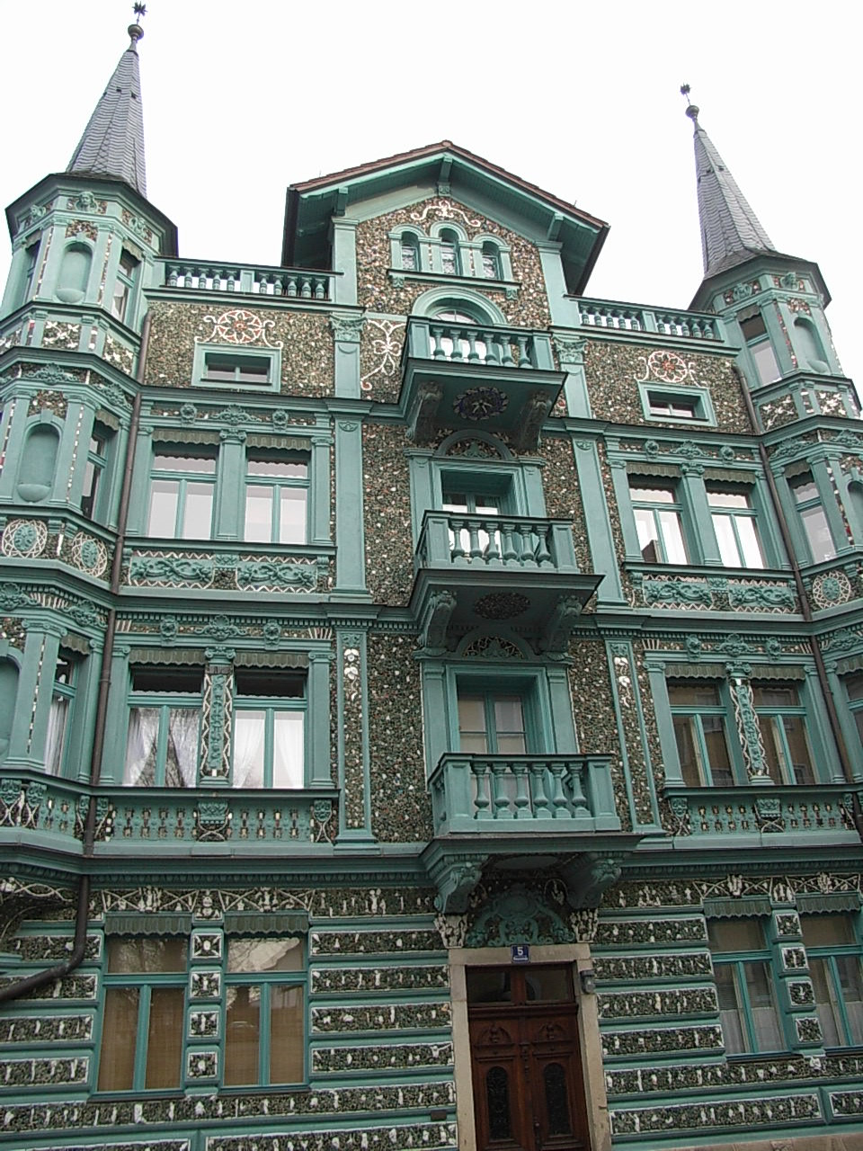 Die Glasscherbenvilla